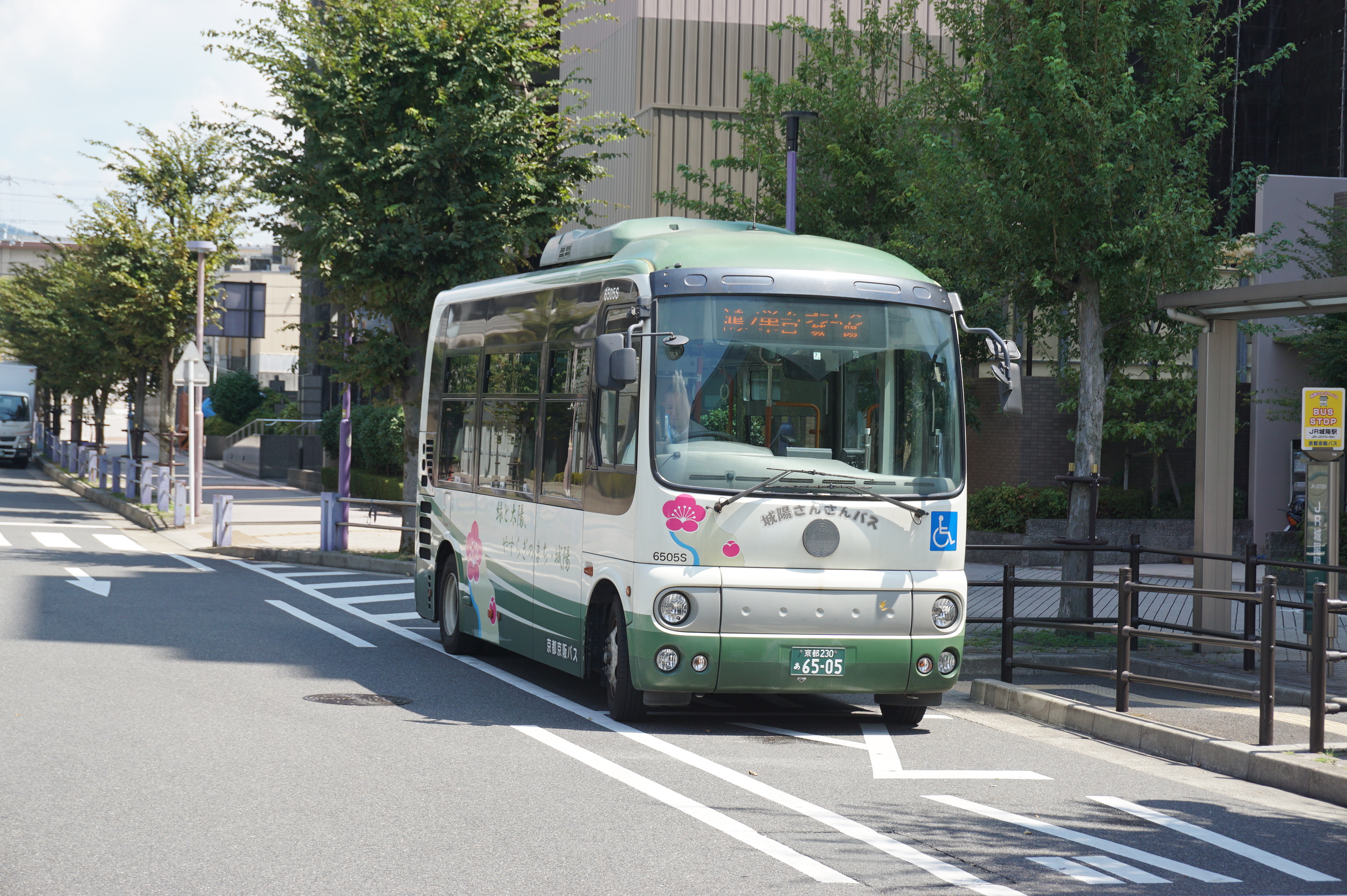 城陽さんさんバス Sony ILCE-6000